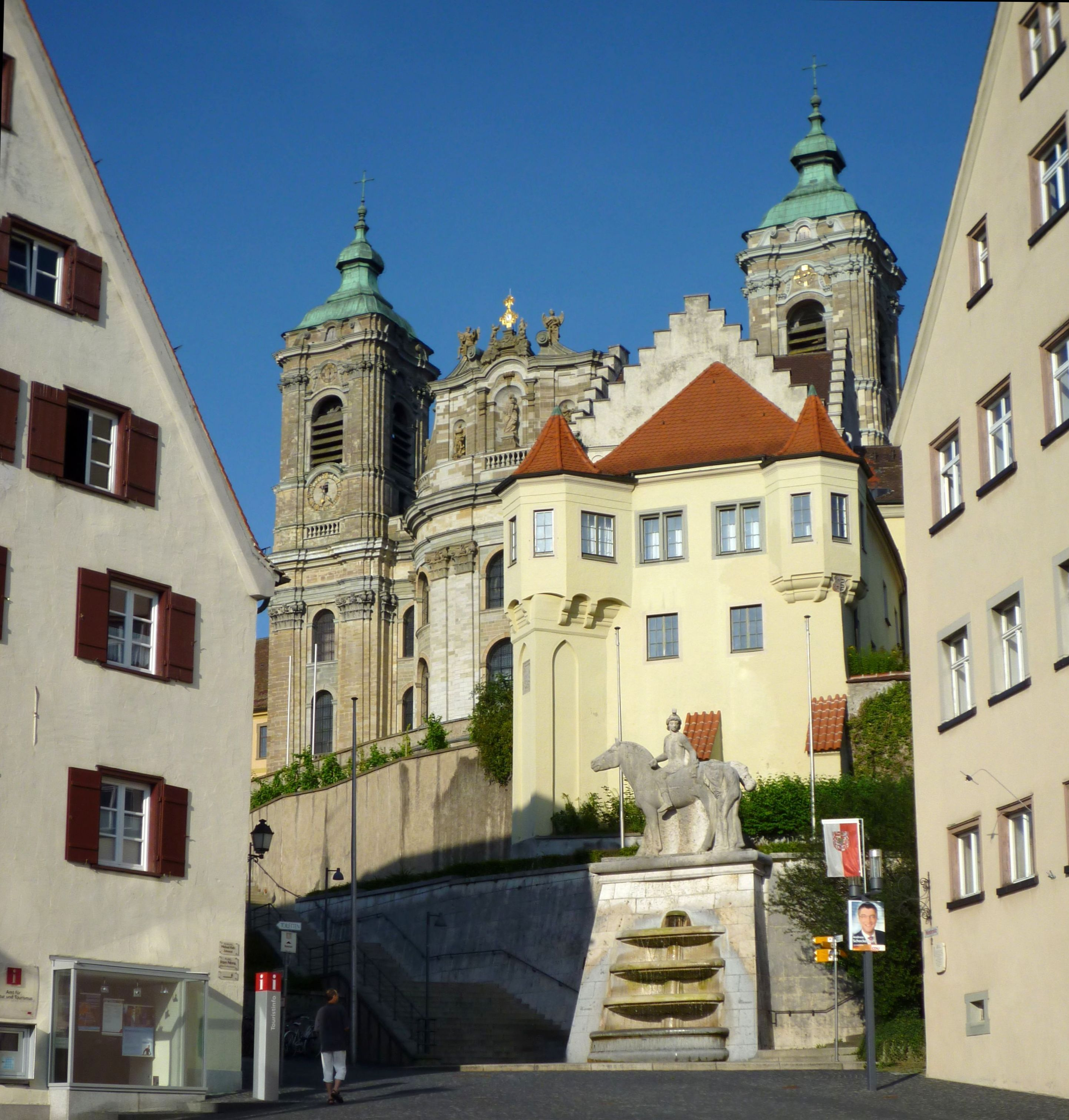 Weingarten - Zugangsbereich zur Basilika St. Martin